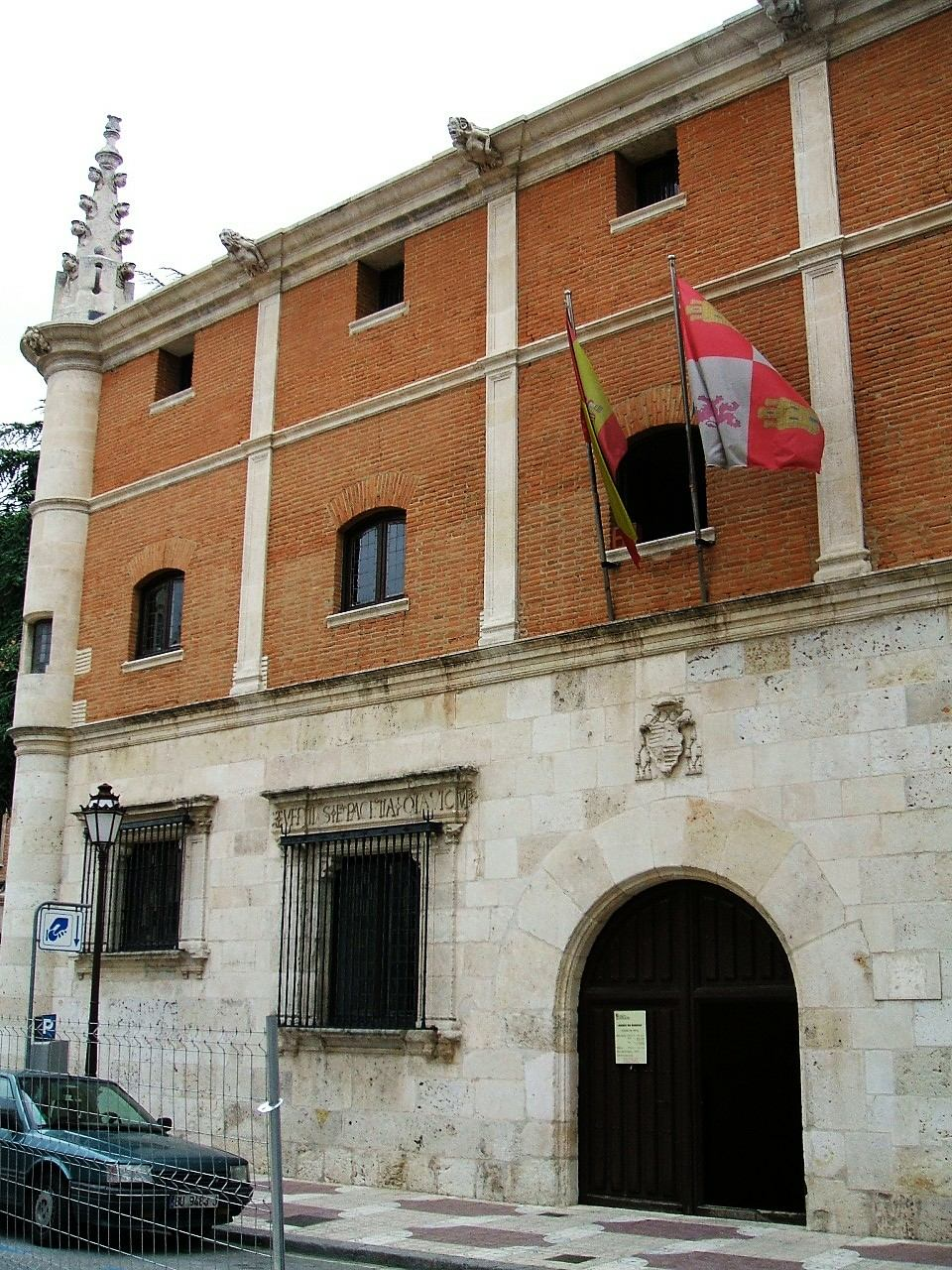 Casa de Miranda, sede del Museo de Burgos (Burgos, España).